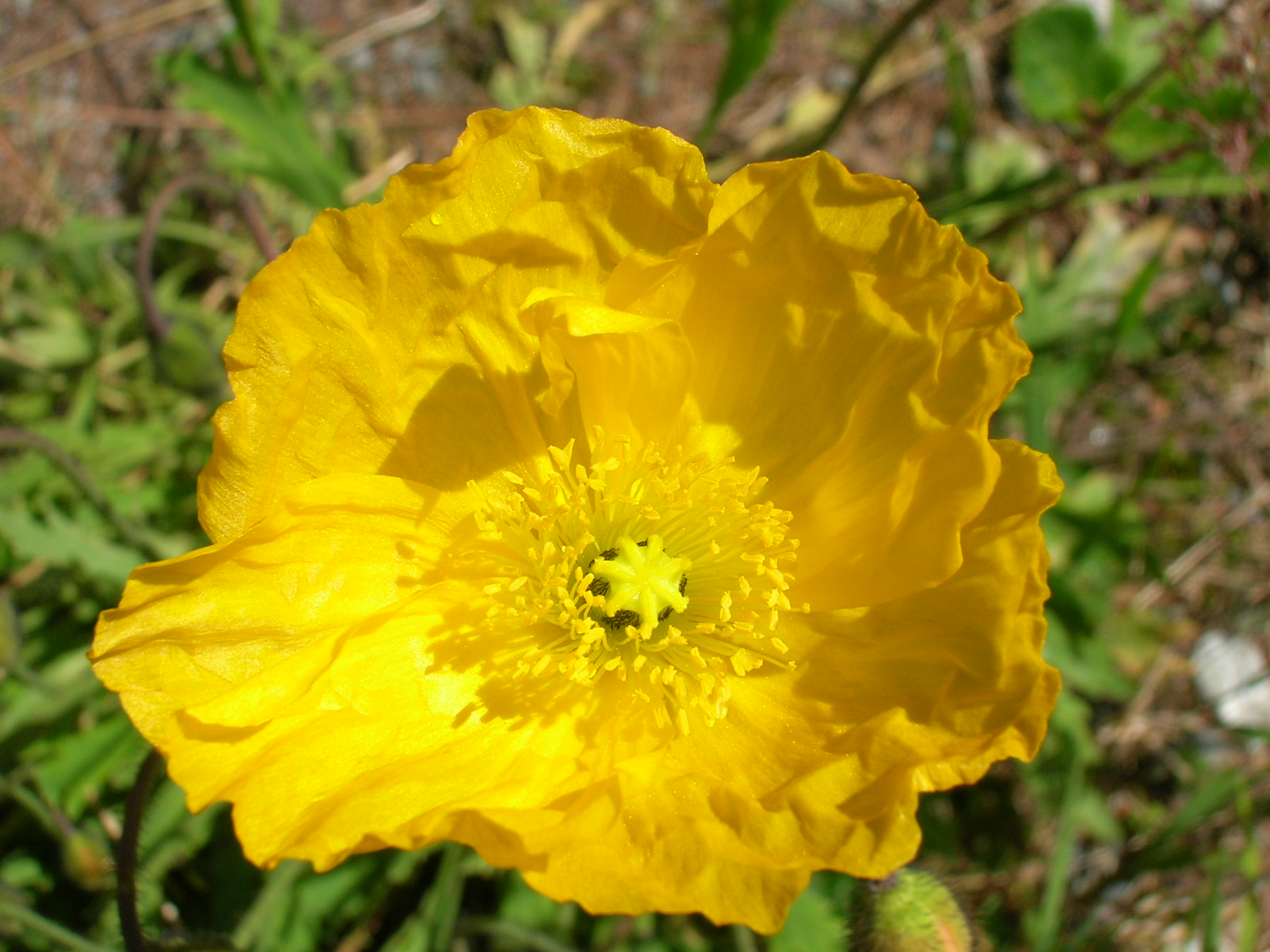 Gelber Alpenmohn (selten, nur im Engadin(?), Schweiz) Papaver rhaeticum